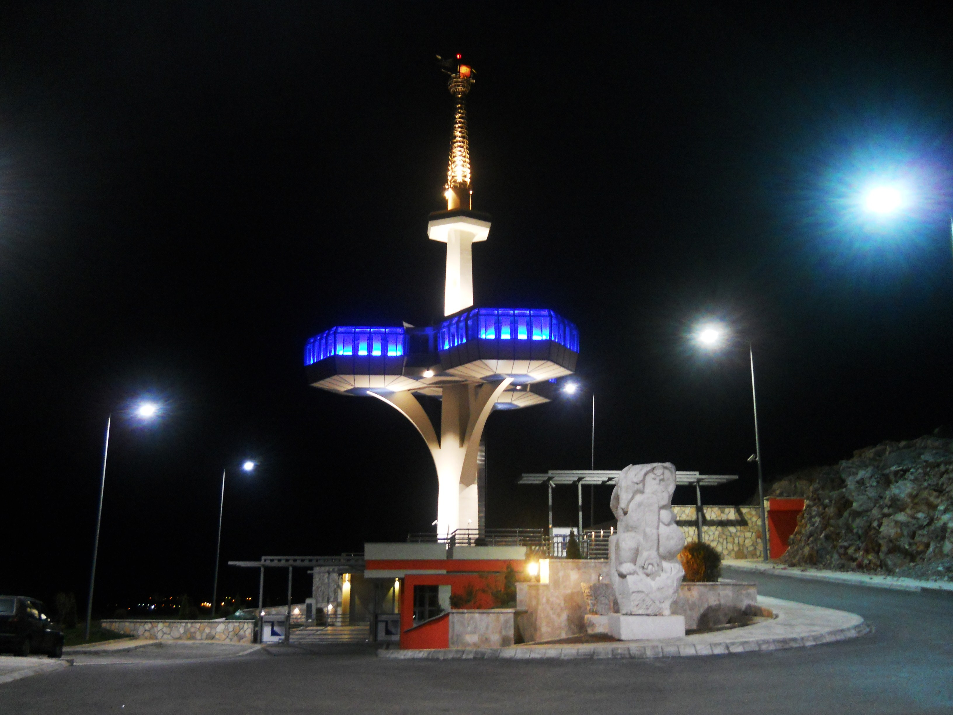 Торањ на Дајбабској Гори, Подгорица